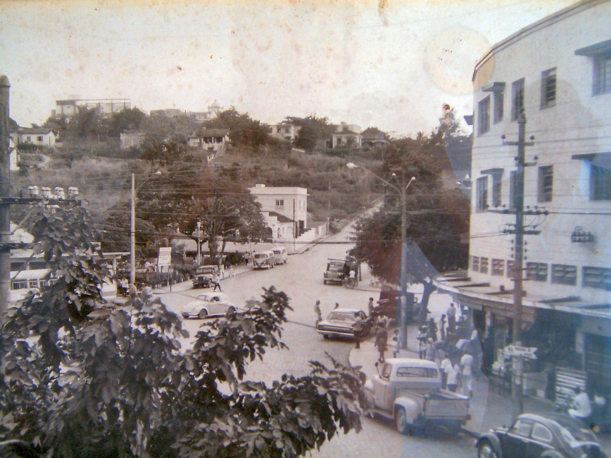 Praça central de Itaguaí, RJ, Brasil, década de 70. Central Square of Itaguai, Rio de Janeiro, Brazil, 70's decade. Silvestre Cirilo dos Santos Neto